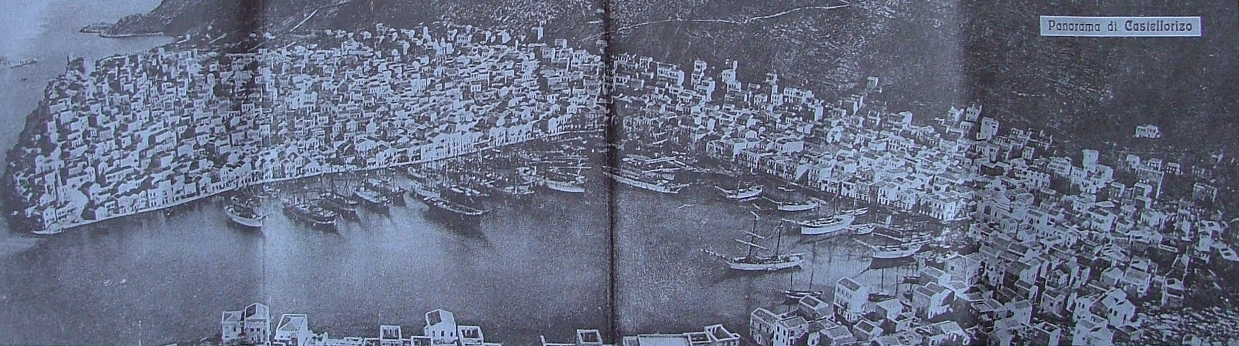 Kastellhorizon um 1920 Eigenes Bild vom 09.05.2006 abfotografiert von der Rückseite einer alten Karte.